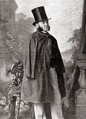 УБРИ Павел Петрович Посол России в Австро-Венгрии 1879-1882